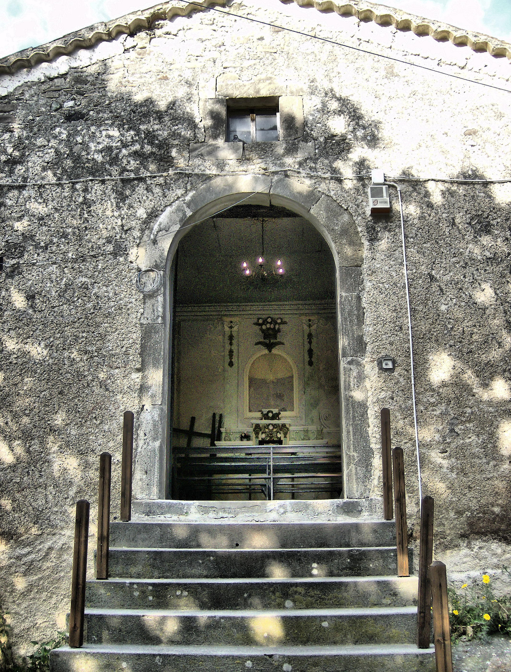 Scattata da Me Medesimo, In Località Augurato di Campora San Giovanni, cedo in licenza cc-by-sa, che carico e metto su commons io stesso, in quanto diretto autore della foto. Distintissimi Saluti--00:28, 10 mag 2009 (CEST)